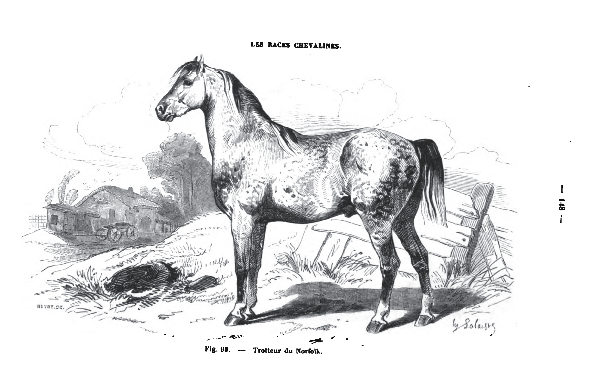 Norfolktravare, Norfolktraber